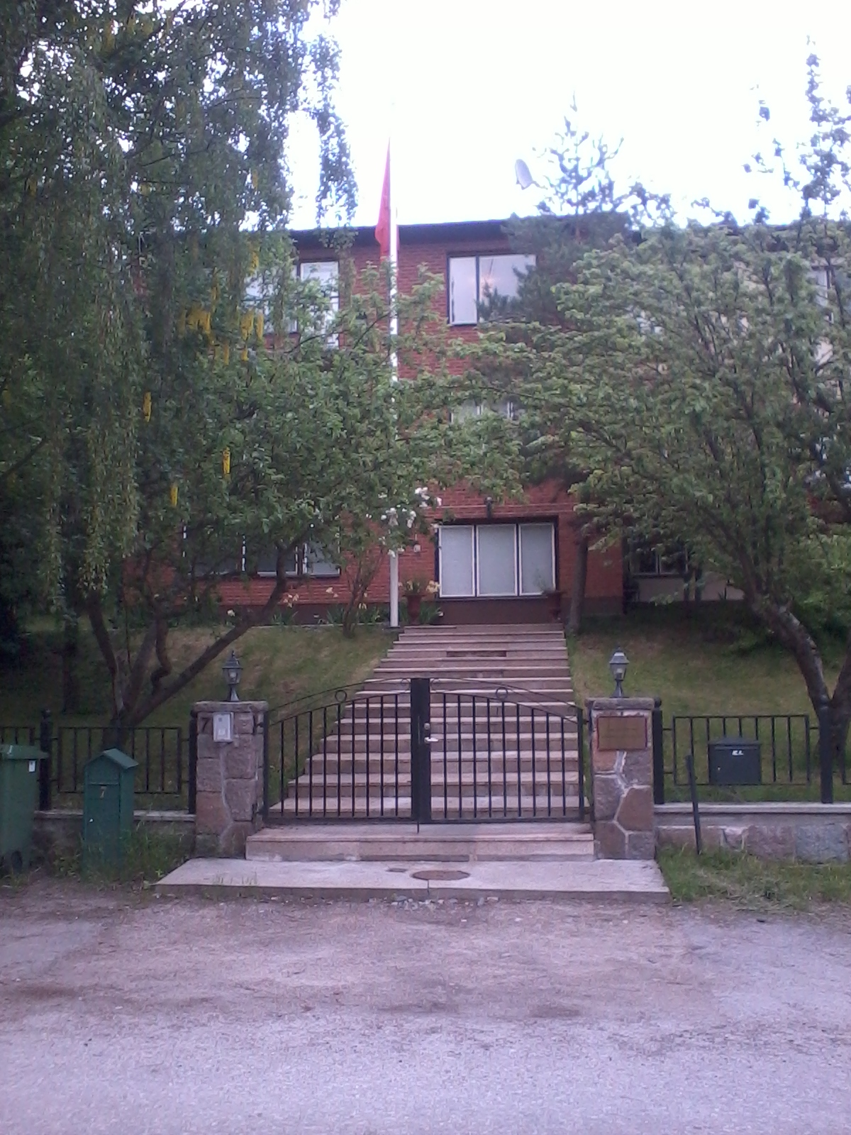 Albaniens ambassad på Lidingö